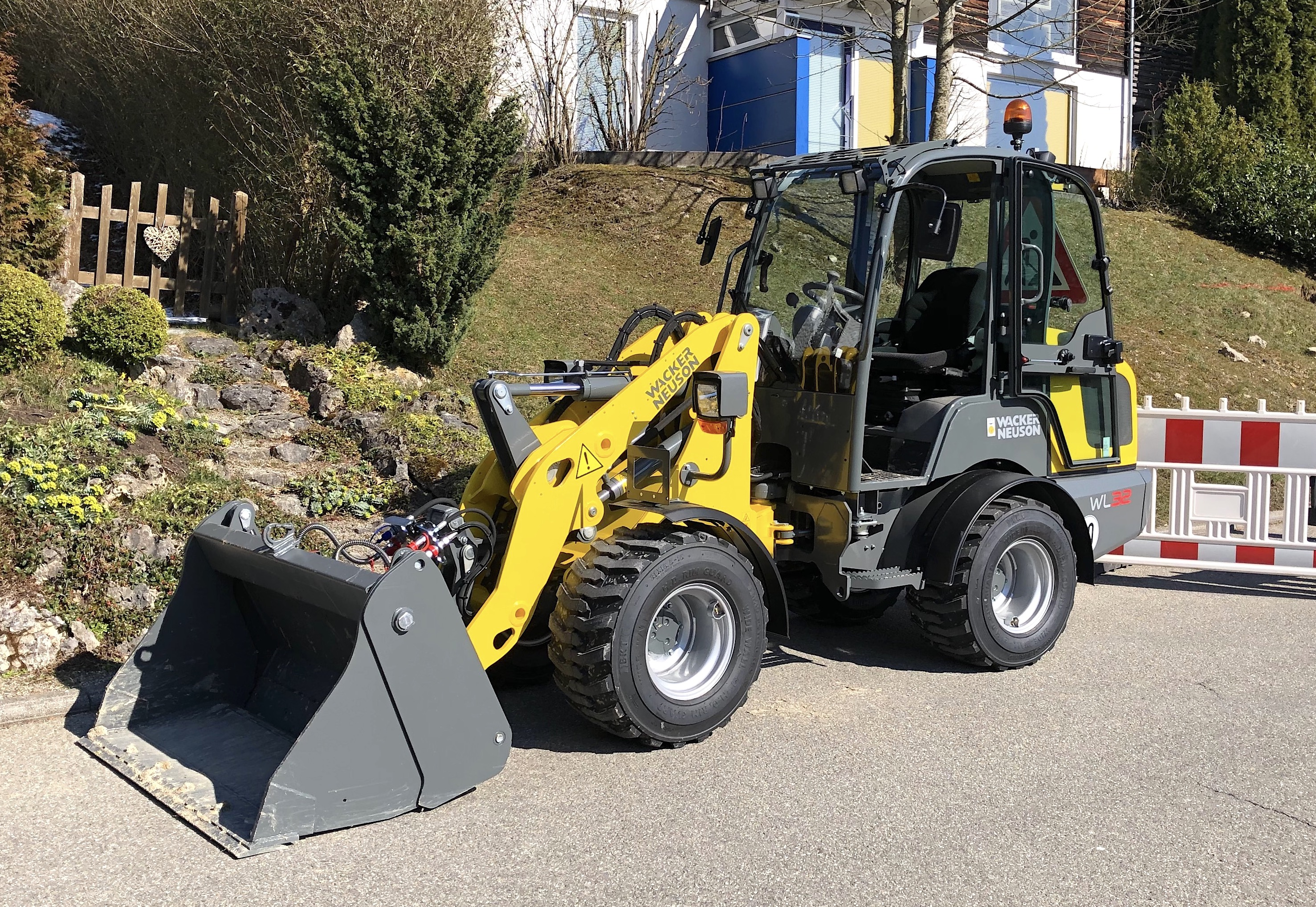 Wacker Neuson, knickgelenkter Radlader WL 32